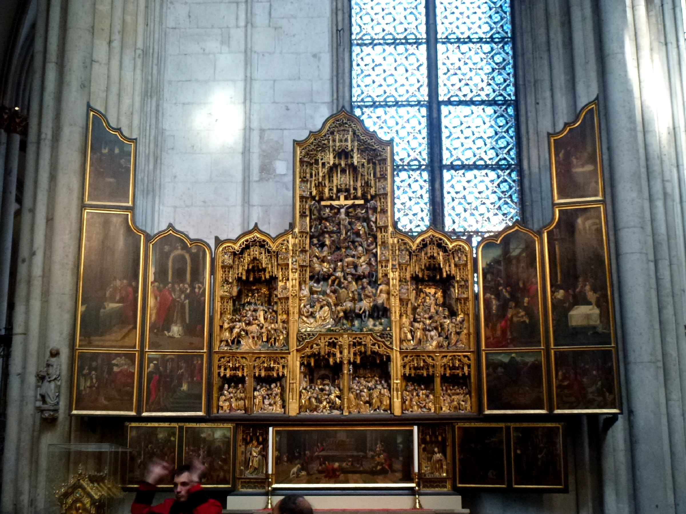 Kölner Dom Köln Germany